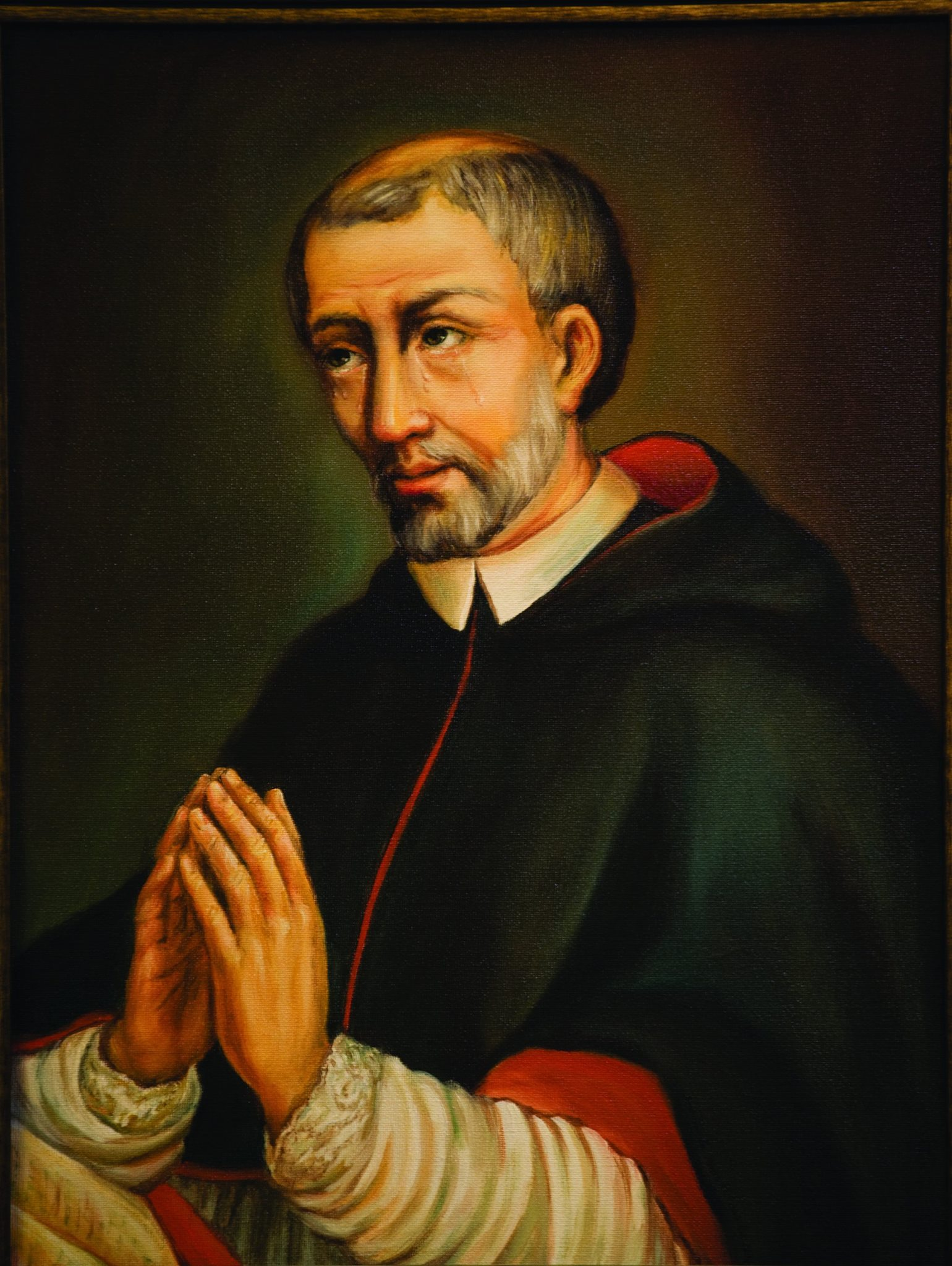 Posthumous portrait of Stanisław Kazimierczyk